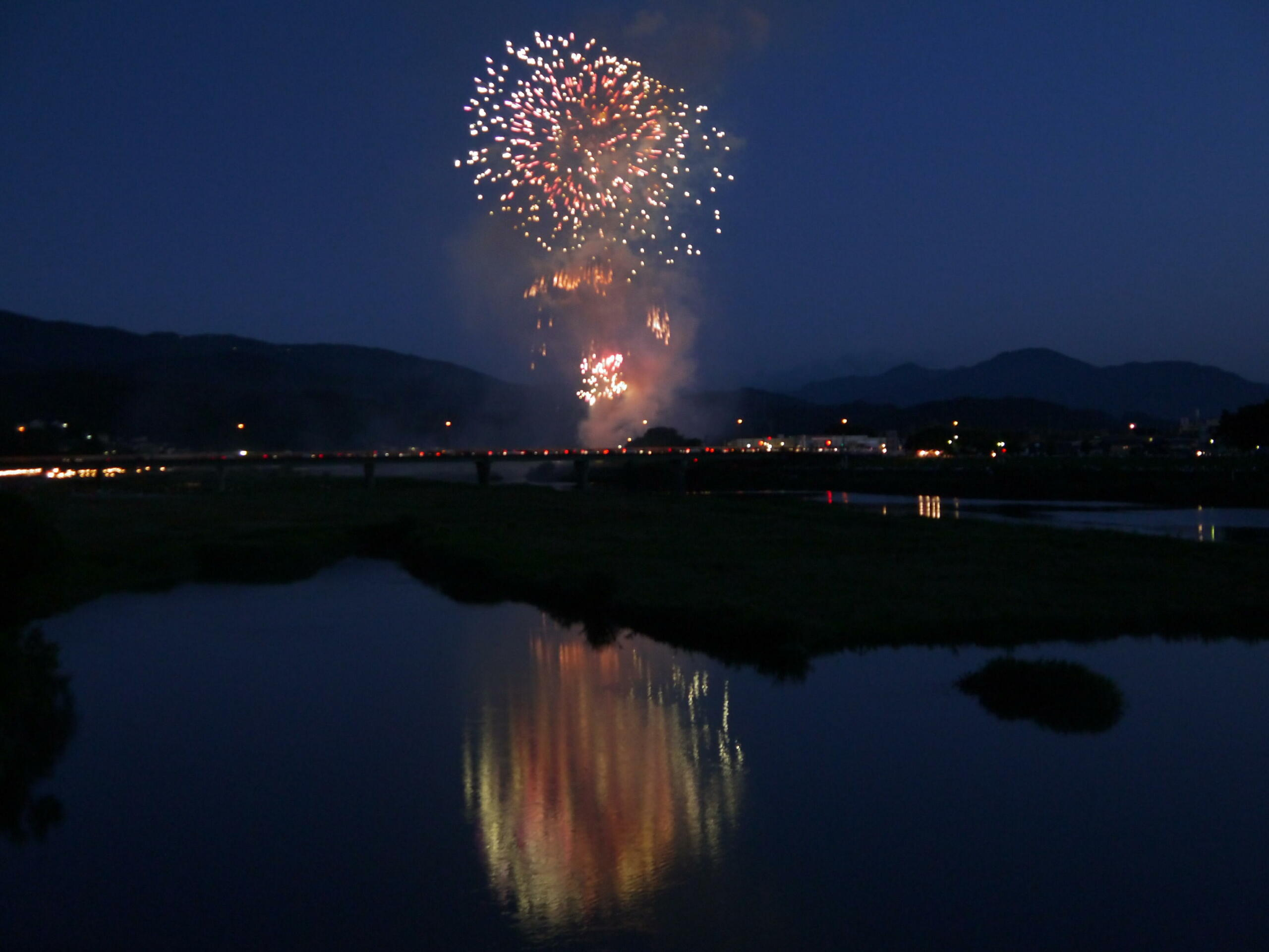 第59回伊勢神宮奉納全国花火大会の様子。2011年7月16日19:30頃に打ち上げ開場の北側にある宮川橋上から撮影した。